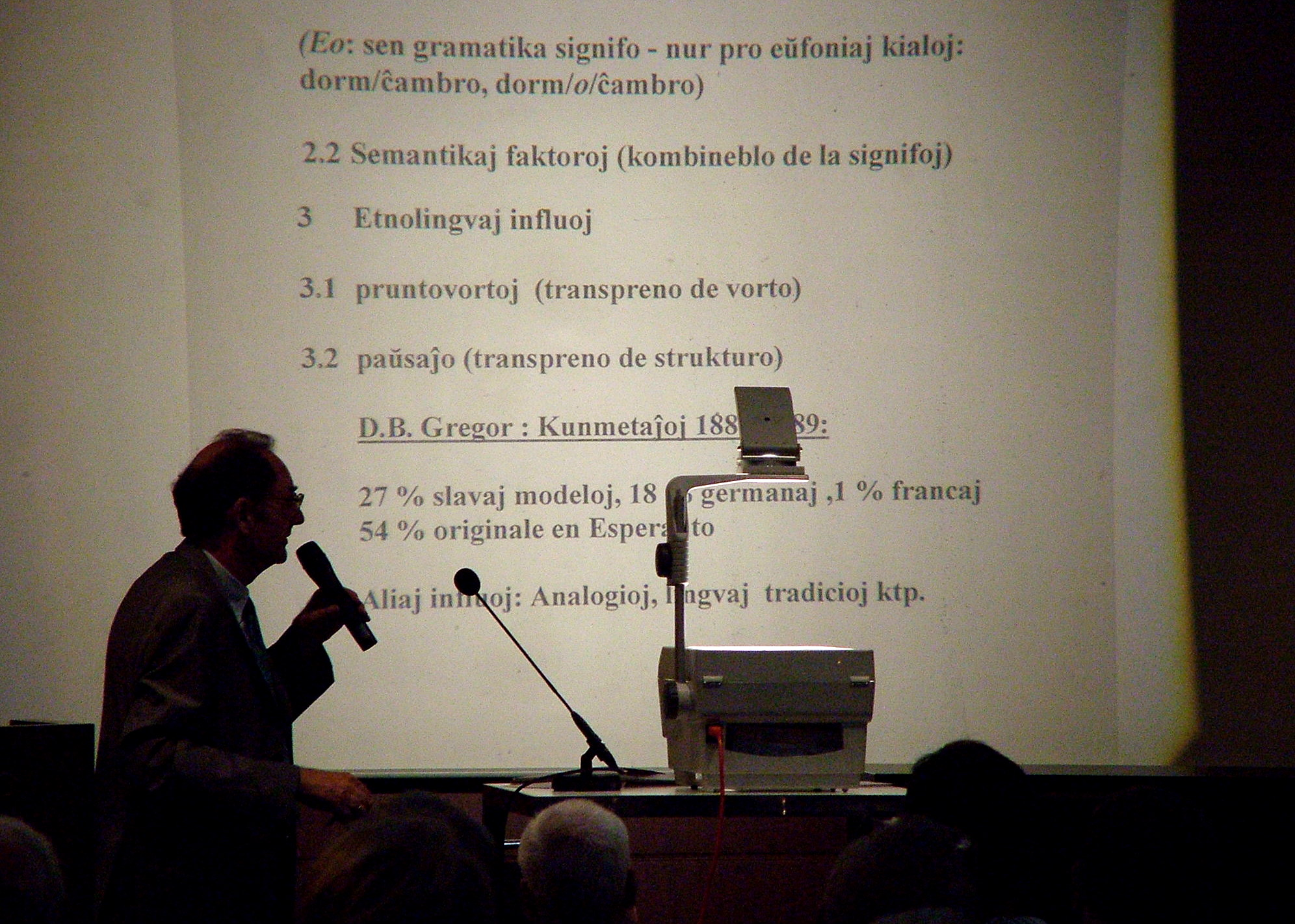 Universala Kongreso de Esperanto, Roterdamo 2008. Esperantologia Konferenco kun Detlev Blanke.